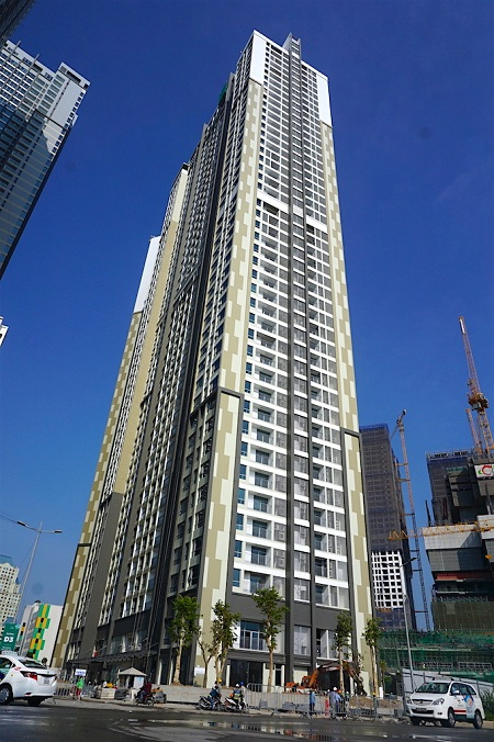 Đây chính là hình ảnh tòa nhà Vinhomes Landmark 1 sau khi hoàn thành, mộ trong những công trình bất động sản có quy mô.